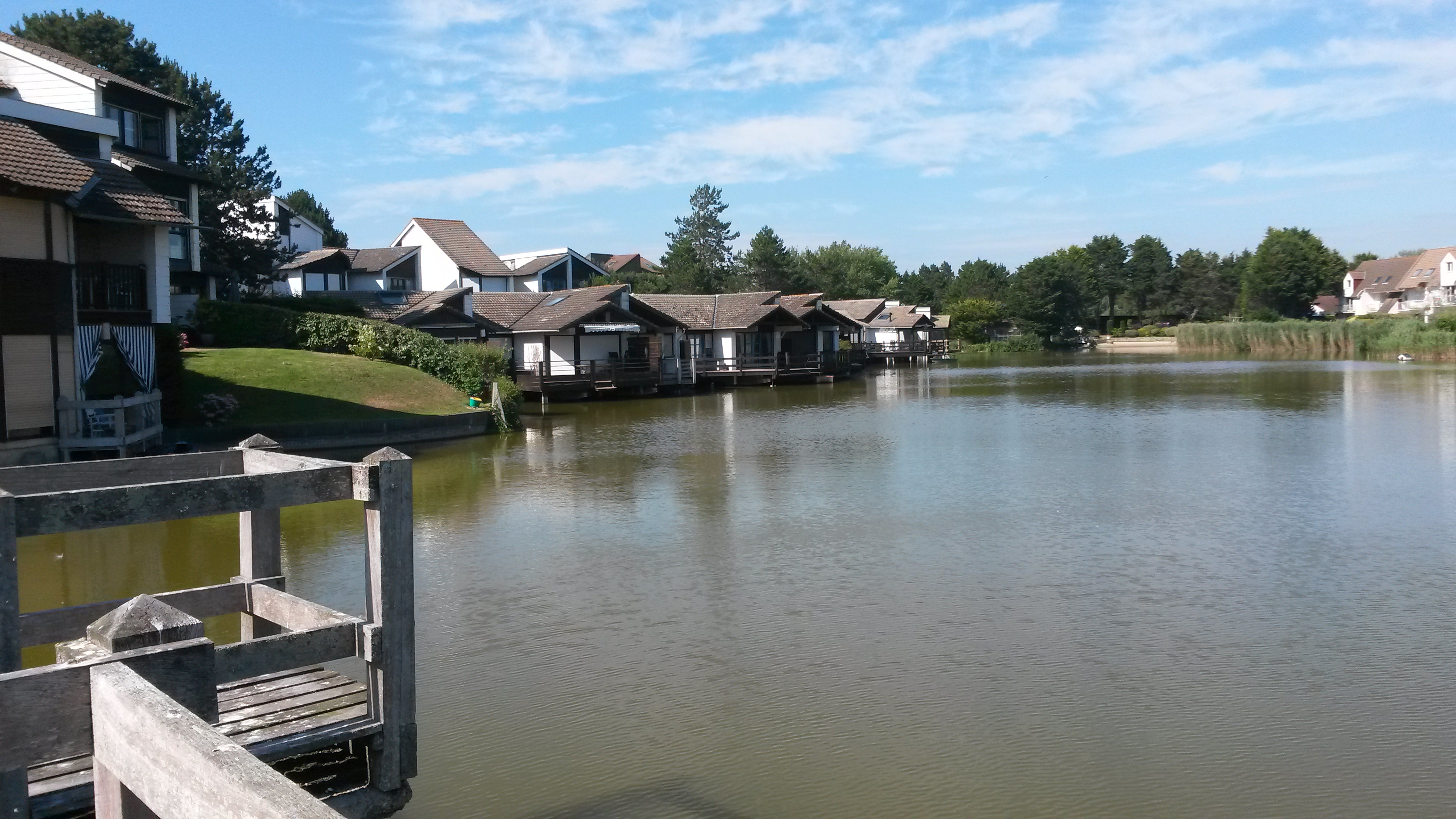 Le Touquet-Paris-Plage 2019